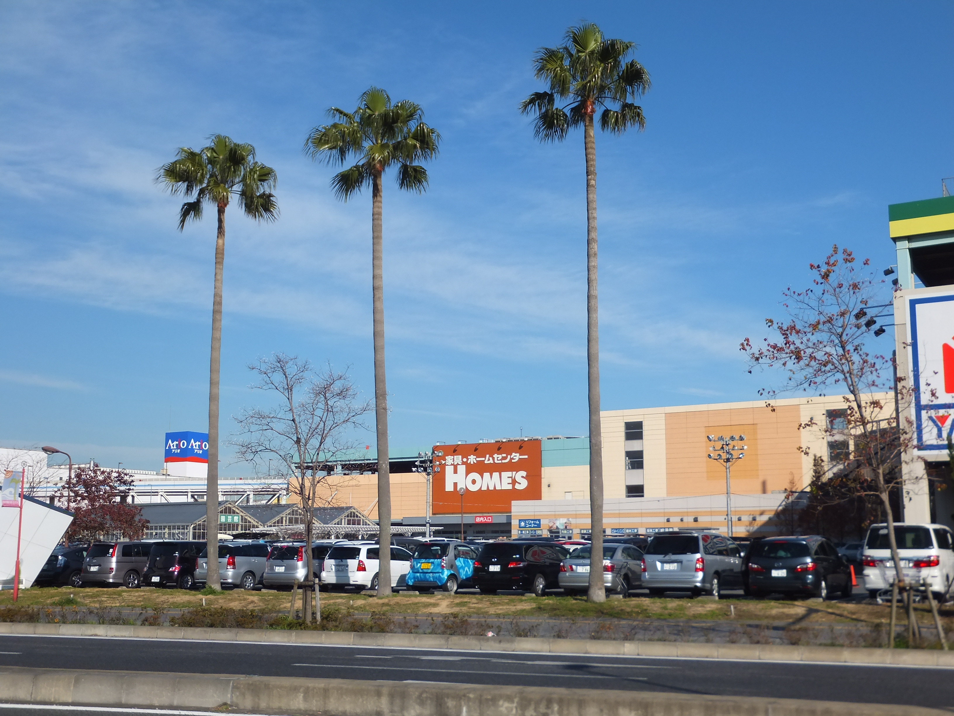 千葉市中央区の蘇我地区にある再開発地区・ショッピングモールハーバーシティ蘇我・ホームズ蘇我店。